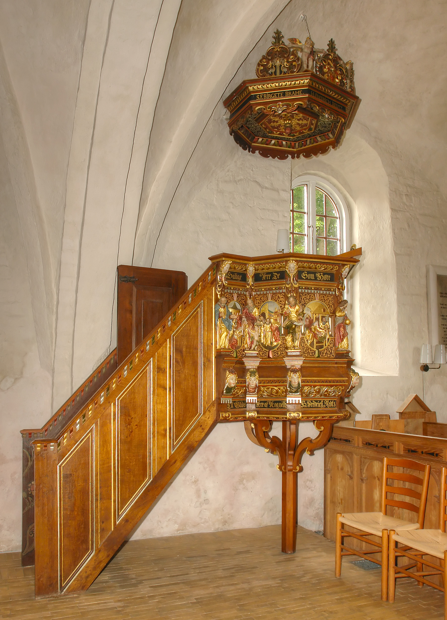 Kirche von Undløse, Dänemark (West-Seeland). Kanzel von 1643 ist von Abel Schrøder dem Jüngeren aus Næstved geschnitzt (restauriert 1936). Am Schalldeckel die Inschrift: S(alig) F(ru) Birgete Brahe. H(r) Fredrich Redtz. FR.W. Sophia Høgh. Anno domini. 1644. Die Inschrift auf der Kanzel: Salige Ære De Som Høre Guds Ord Oc bevare Dett. Luc. c. II v. 28 und Til Guds Ære af Æ(rværdige) og velb(yrdige) H(r) Frederich Redtz oc f(ru) Sophia Høgh Til denne Sted foræritt.